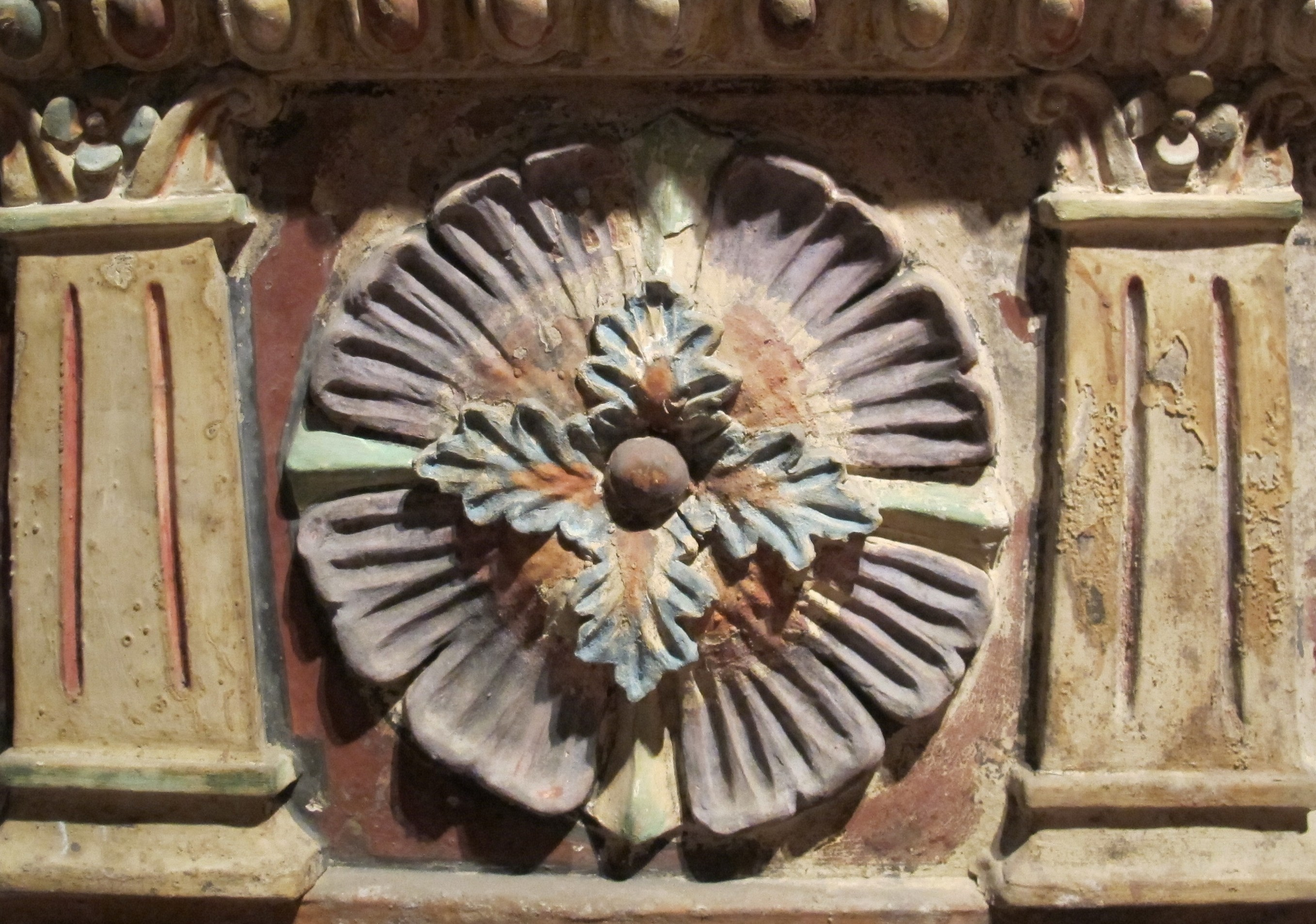 Sarcofago di Larthia Seianti - Rosone